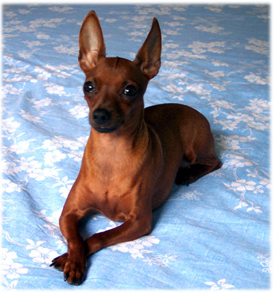 Esemplare adulto di femmina di Zwergpinscher o Pinscher Nano.